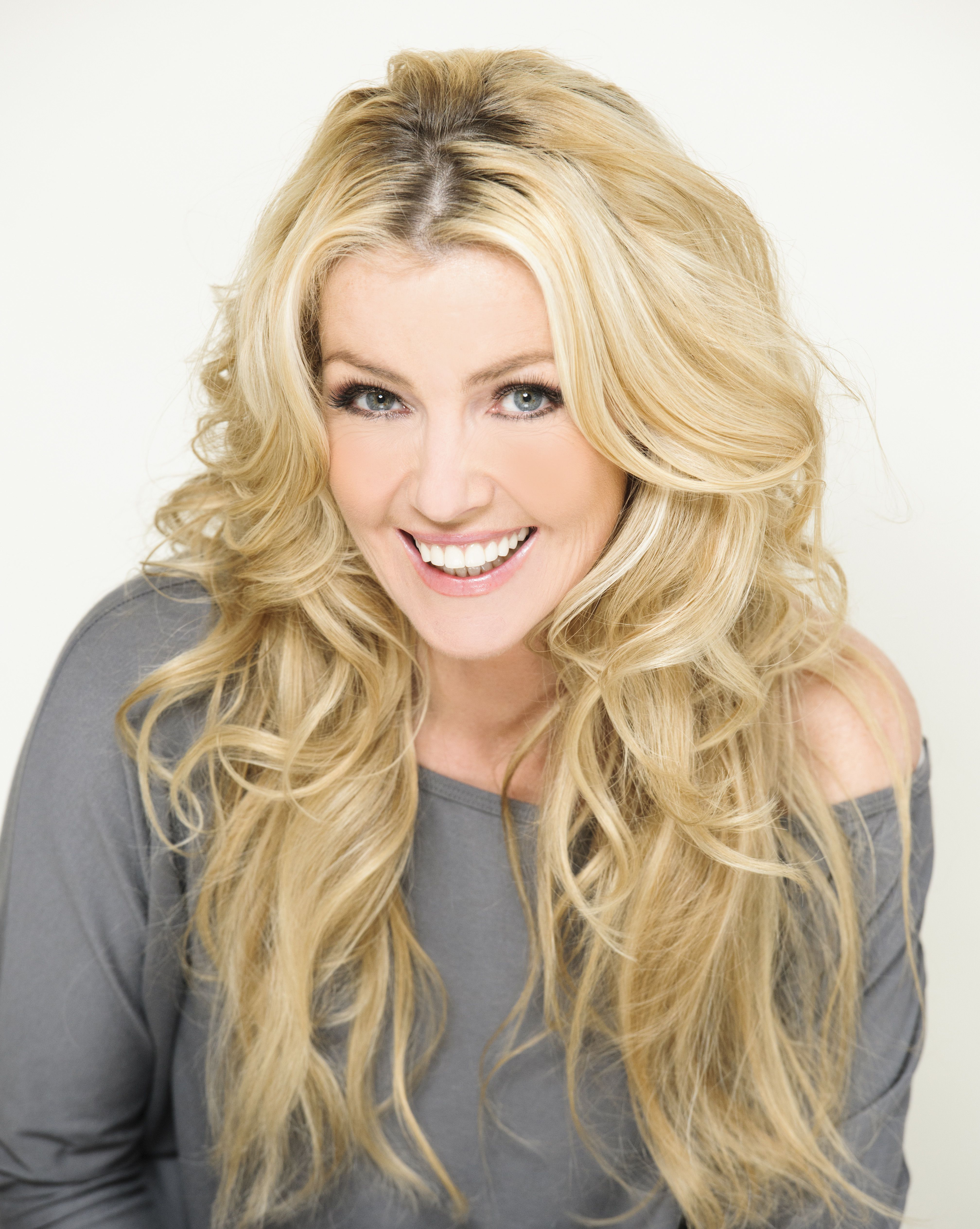 Musical actrice